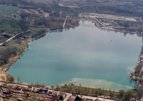 Palatinus Lake, Hungary